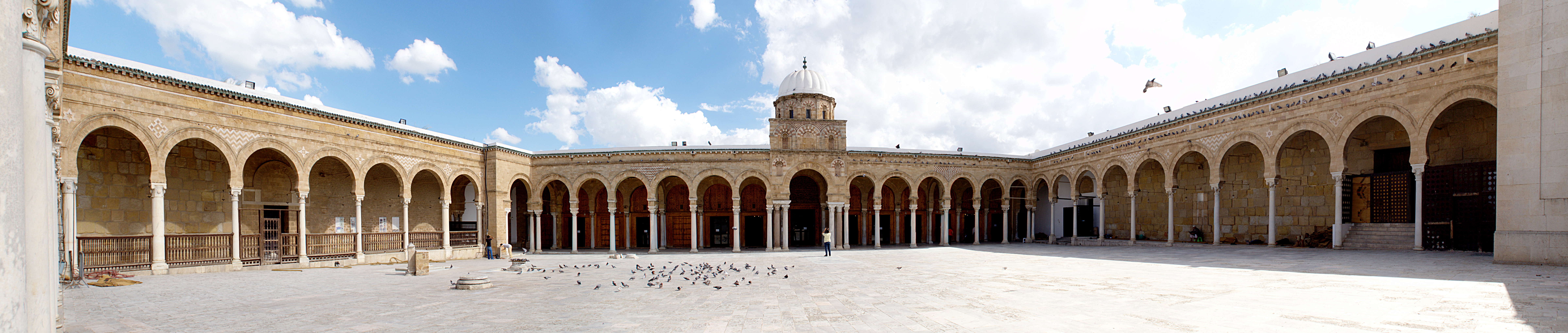 Grande Mosquée (Djamaa Zitouna), Tunis This image was created with Hugin.